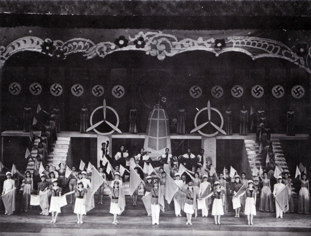 松竹少女歌劇レビュー「フランス起てり」